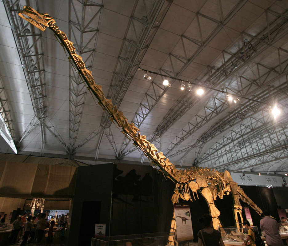 Huabeisaurus - 01